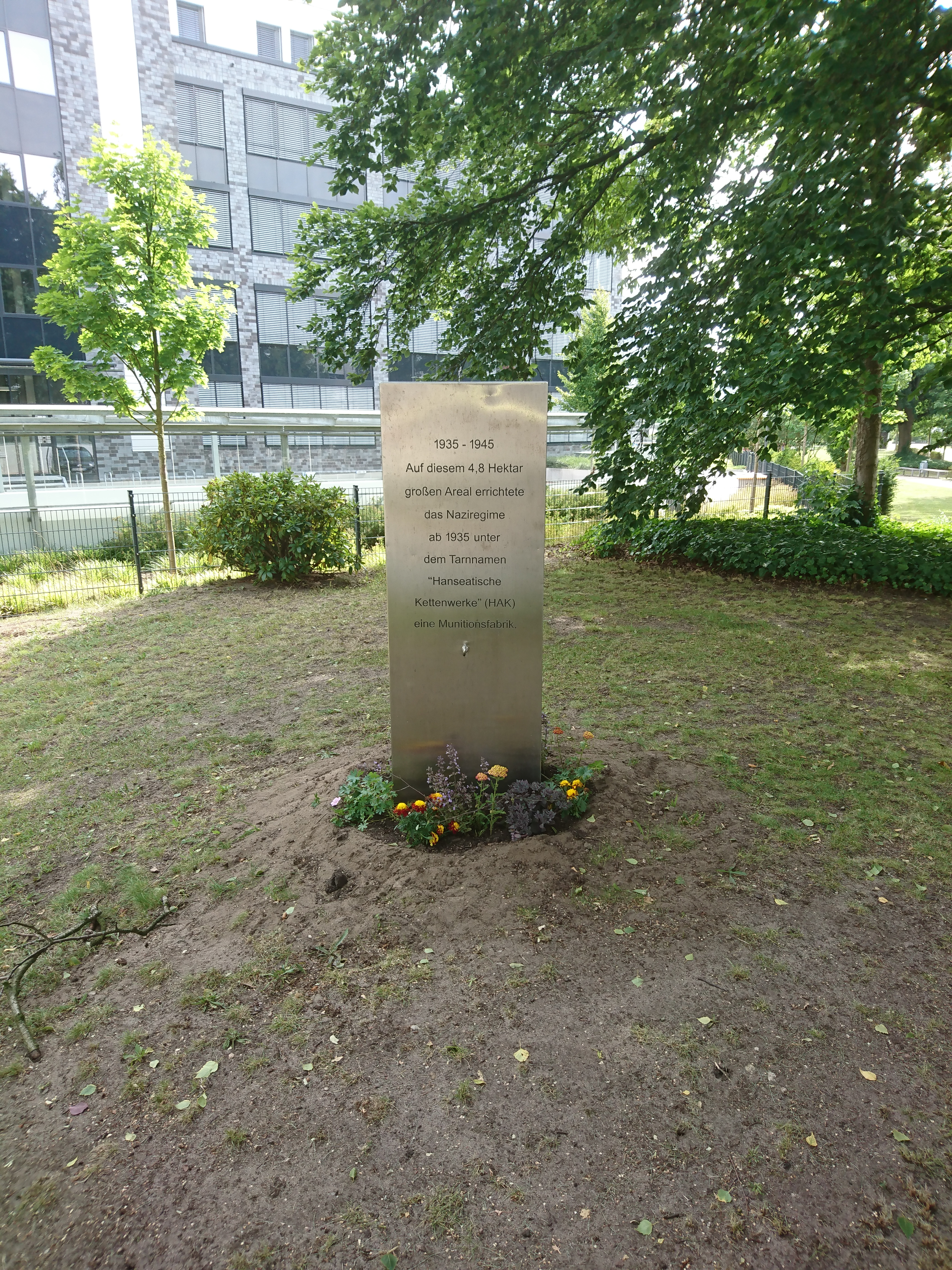 Gedenkstele zur Erinnerung an die Zwangsarbeiter der Hanseatischen Kettenwerke, Hamburg-Langenhorn. Neuer Standort.